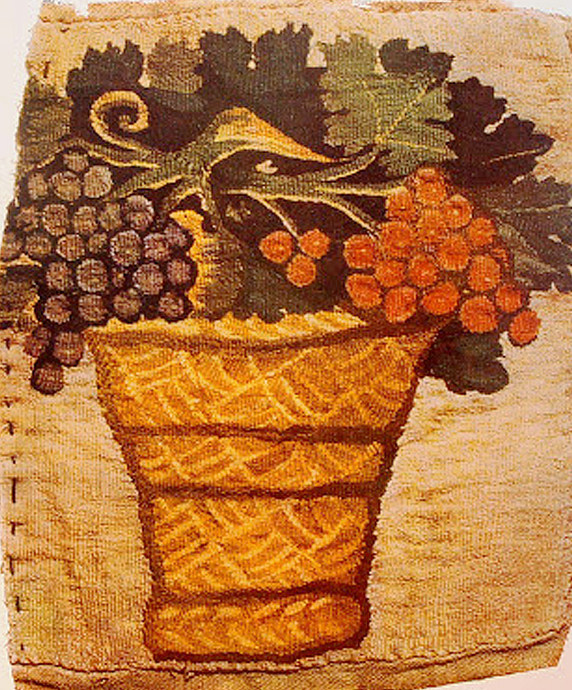 Panier de raisins sur textile art copte du IVe s, Musée Pouchkine, Moscou